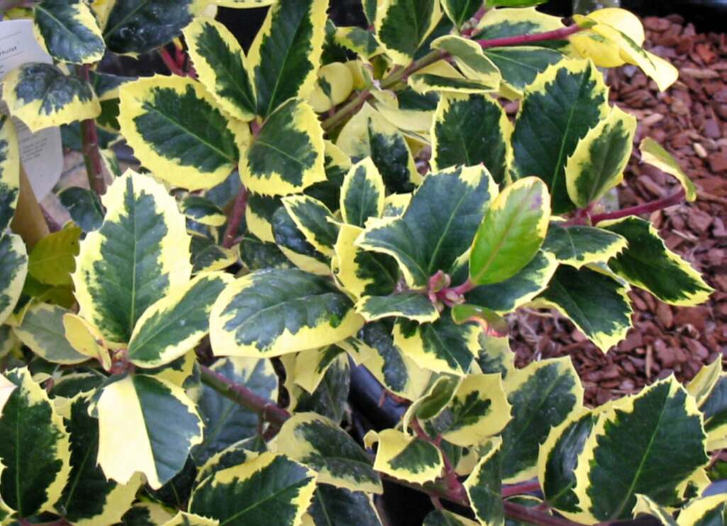 Ilex x altaclarensis 'Golden King' Photo JH Mora février 2006